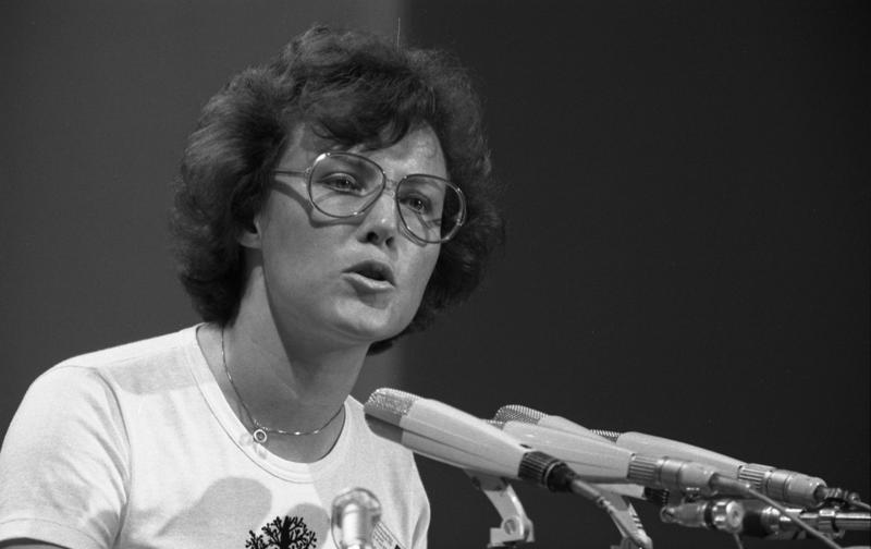 Außerordentlicher Parteitag der SPD in der Westfalenhalle Dortmund